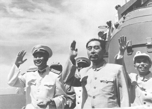 1957年“八一”建军节，周恩来、萧劲光等人在青岛检阅海军。